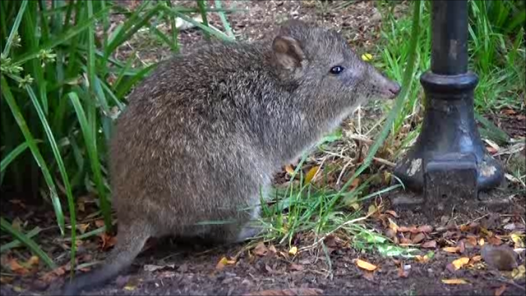 Potorous trydactilus wiki1